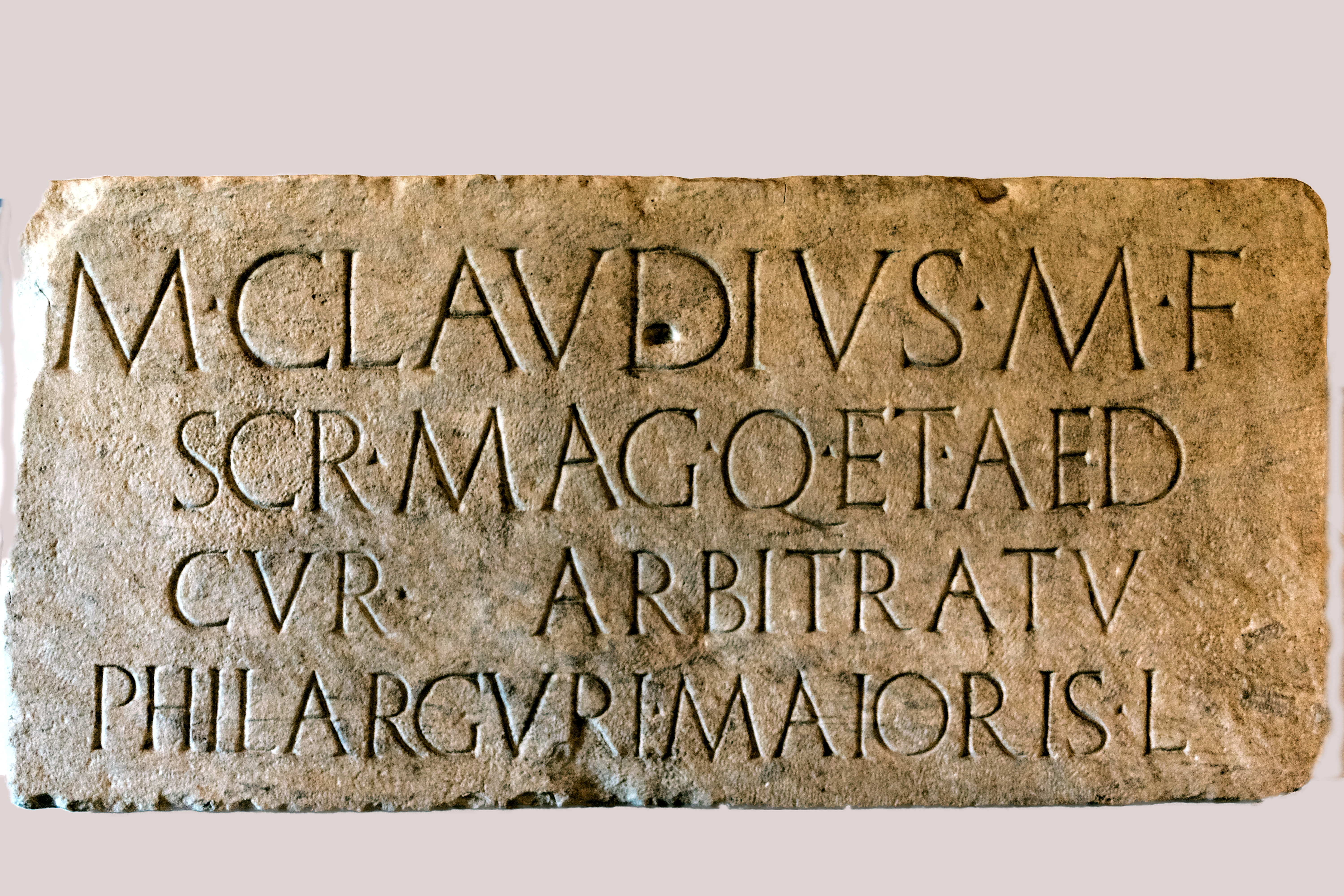 Die Steintafel eines Grabmonuments von Marcus Claudius aus dem Ende des 1. Jahrhunderts n. Chr., der Princeps der Vereinigung von Schreibern gewesen war, die im Dienst der Quästoren und der Ädilen gestanden hatte. AE 1939, 153: M(arcus) Claudius M(arci) f(ilius) / scr(ibarum) mag(ister) q(uaestoriorum) et aed(ilium) / cur(ulium) arbitratu / Philarguri Maioris l(iberti)